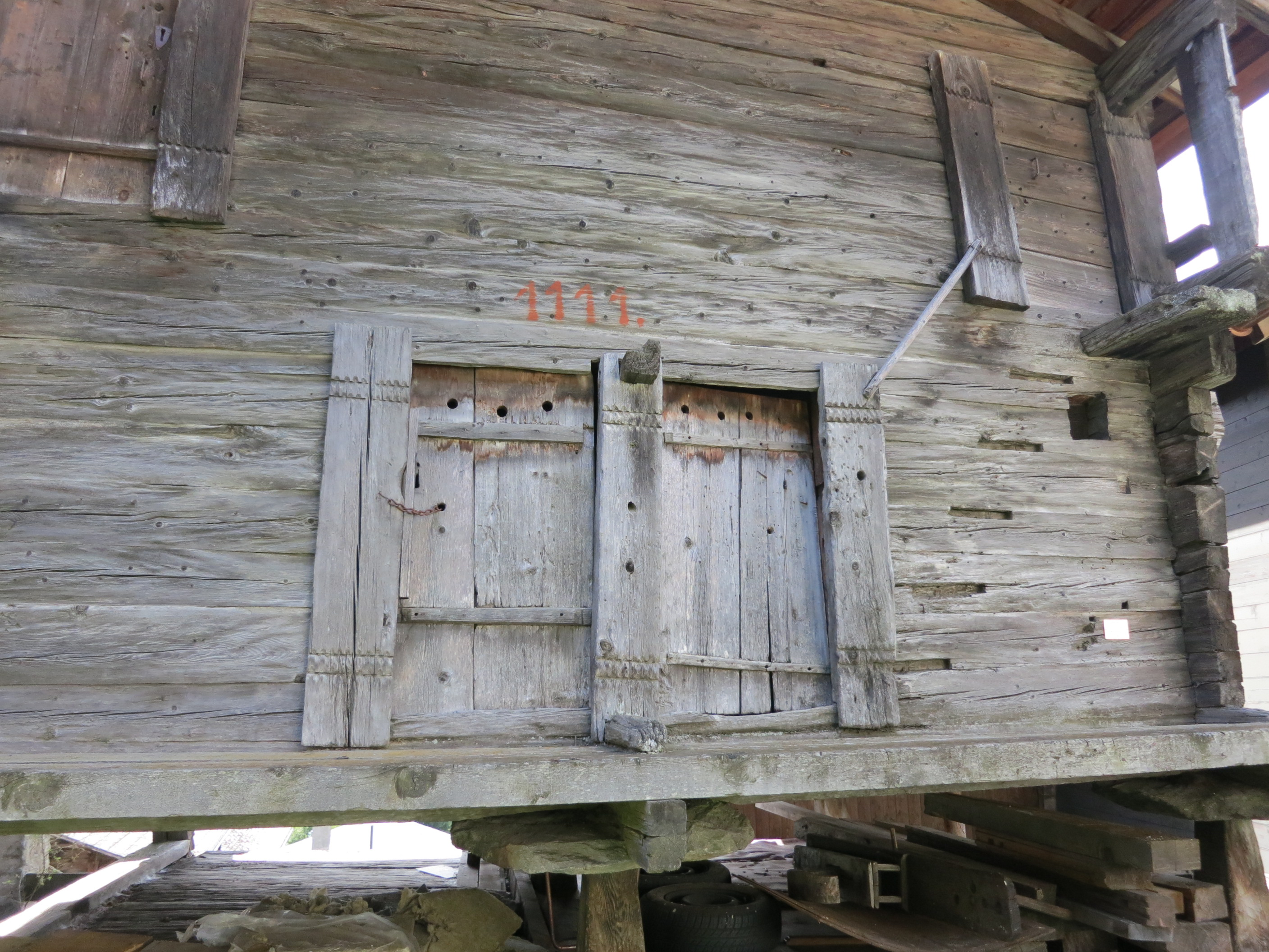 Speicher, Mühlebach, Ernen VS, Schweiz